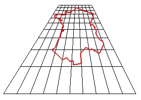 france par homologie Auteur : robert ferréol Copie libre